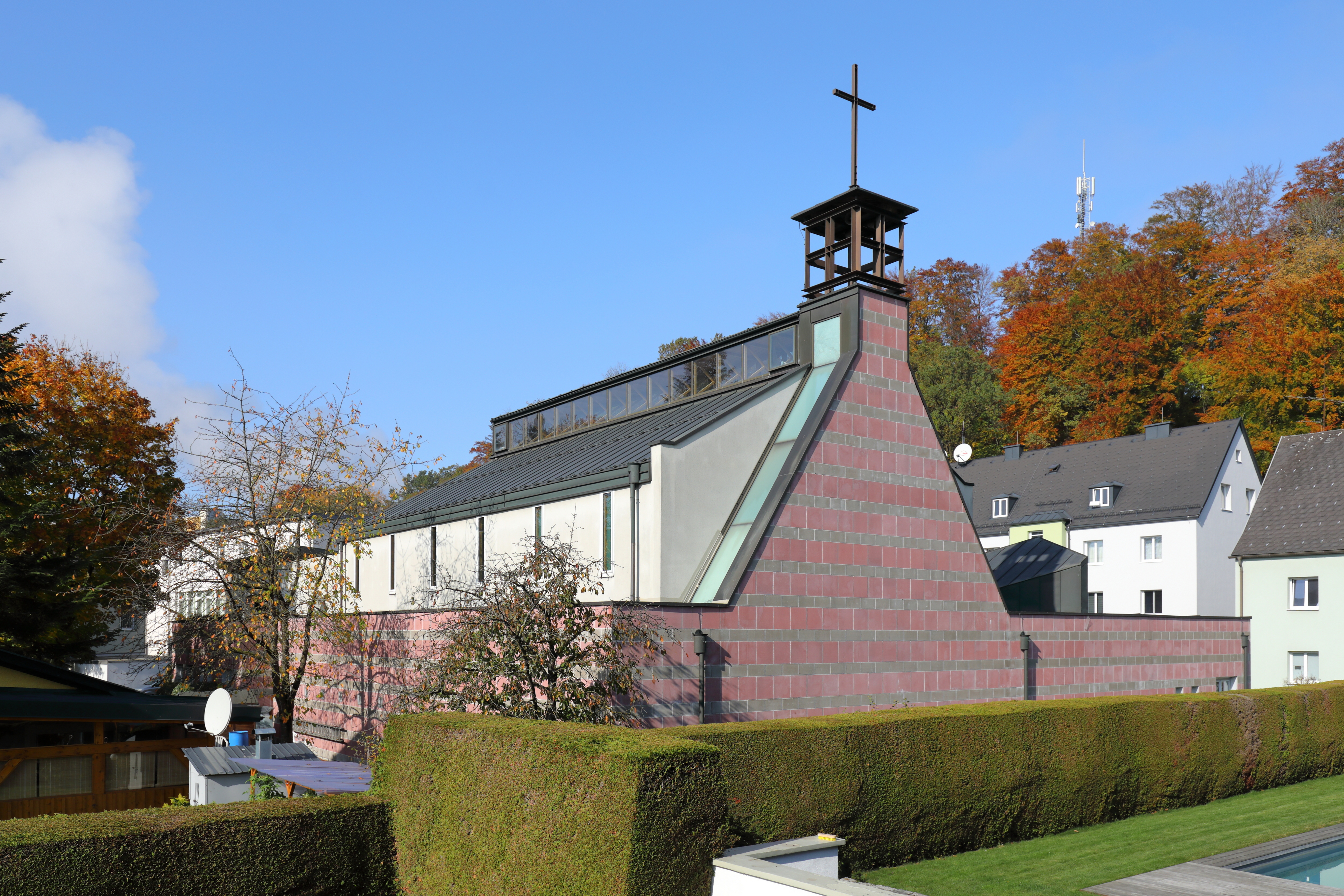 Südostansicht der röm.-kath. Kirche hl. Josef in Steyrermühl, ein Ortsteil der oberösterreichischen Stadtgemeinde Laakirchen.Das Kirchengebäude wurde nach den Plänen des Architektenteams Königsmaier-Schmitzberger von 1988 bis 1990 errichtet und am 28. April 1991 durch Bischof Maximilian Aichern geweiht.